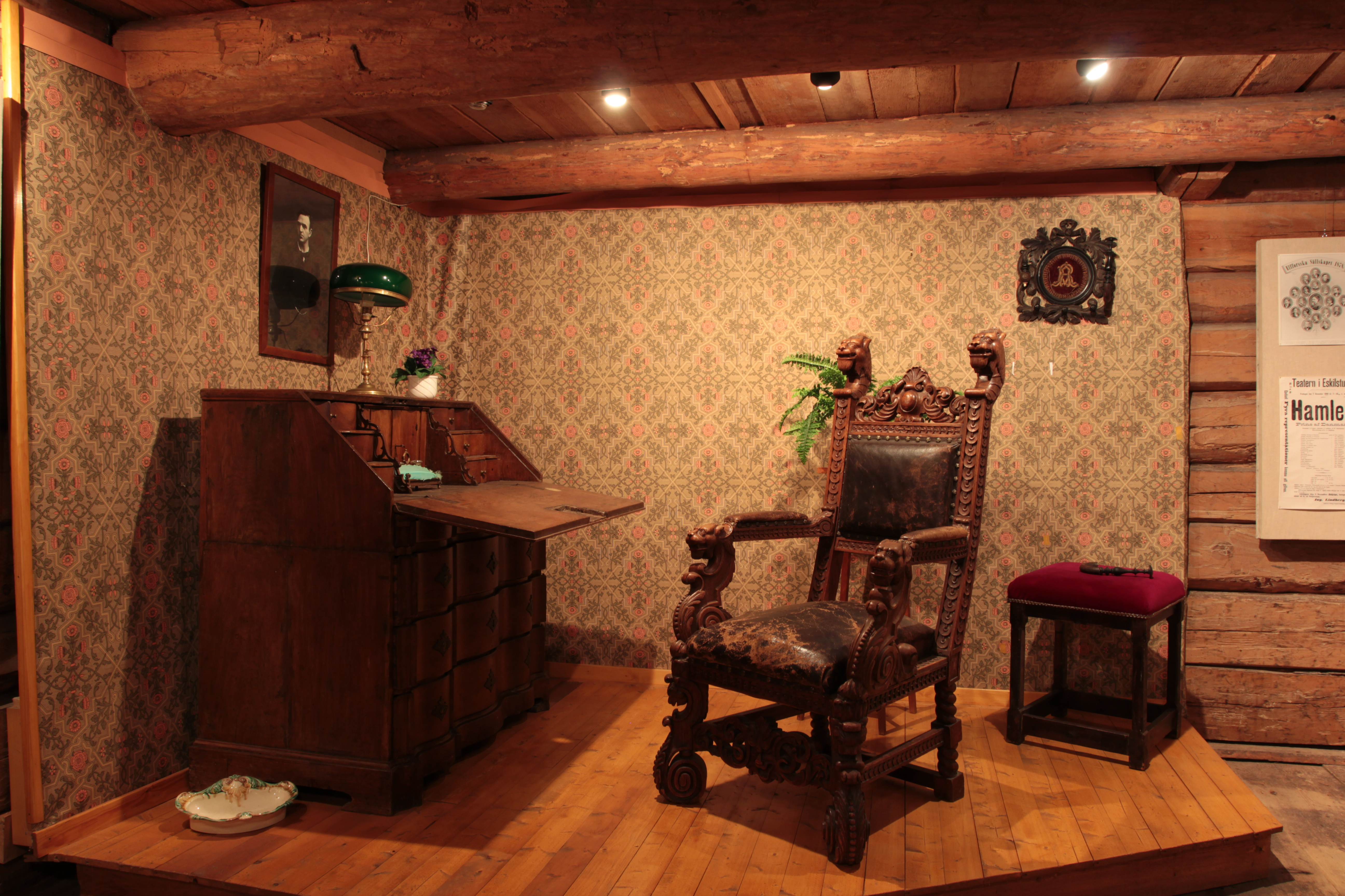 Hedemora Gamla Theater